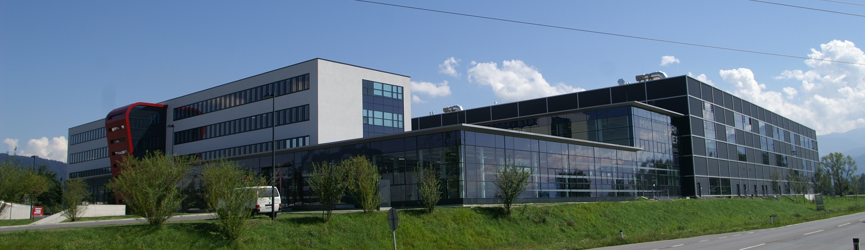 die Firma Ulmer Haberkorn in Wolfurt